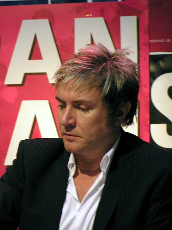 Summary Bildbeschreibung: Simon Le Bon am 02.10.2004 (Berlin, Saturn) Quelle: Geheimnisträgerin Fotograf/Zeichner: Geheimnisträgerin Datum: 02.10.2004 Sonstiges: Autogrammstunde im Saturn, Potsdamer Platz, Berlin